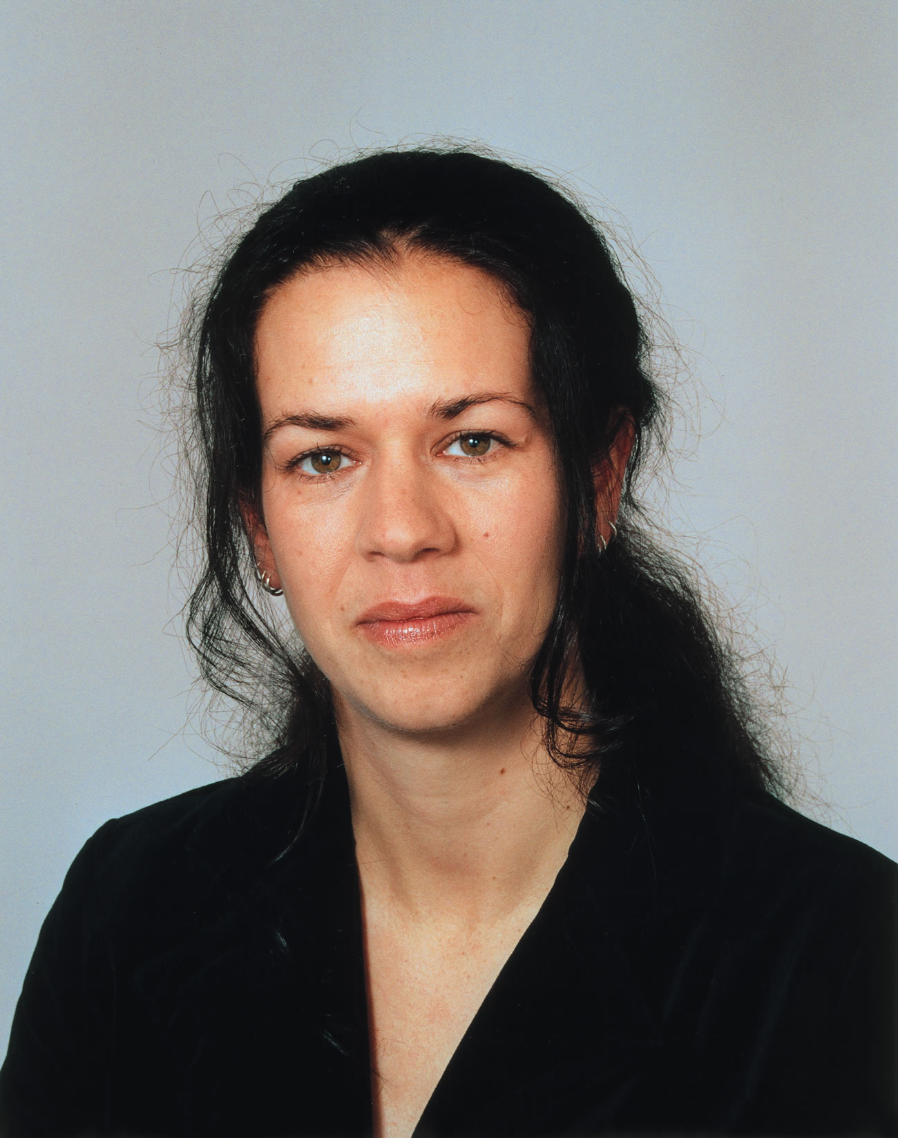 Nathalie de Rooij